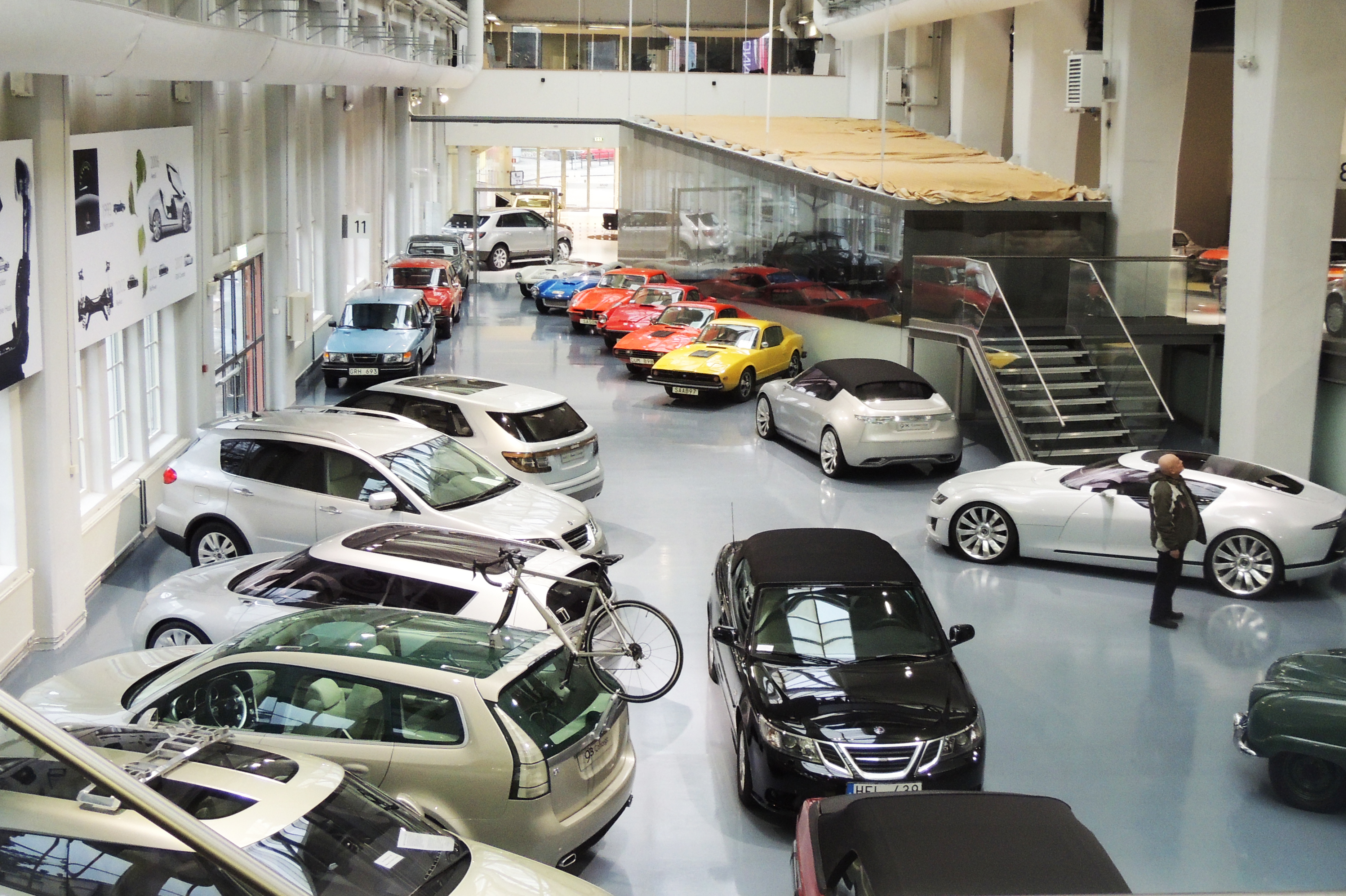 Saab Car Museum - widok 1